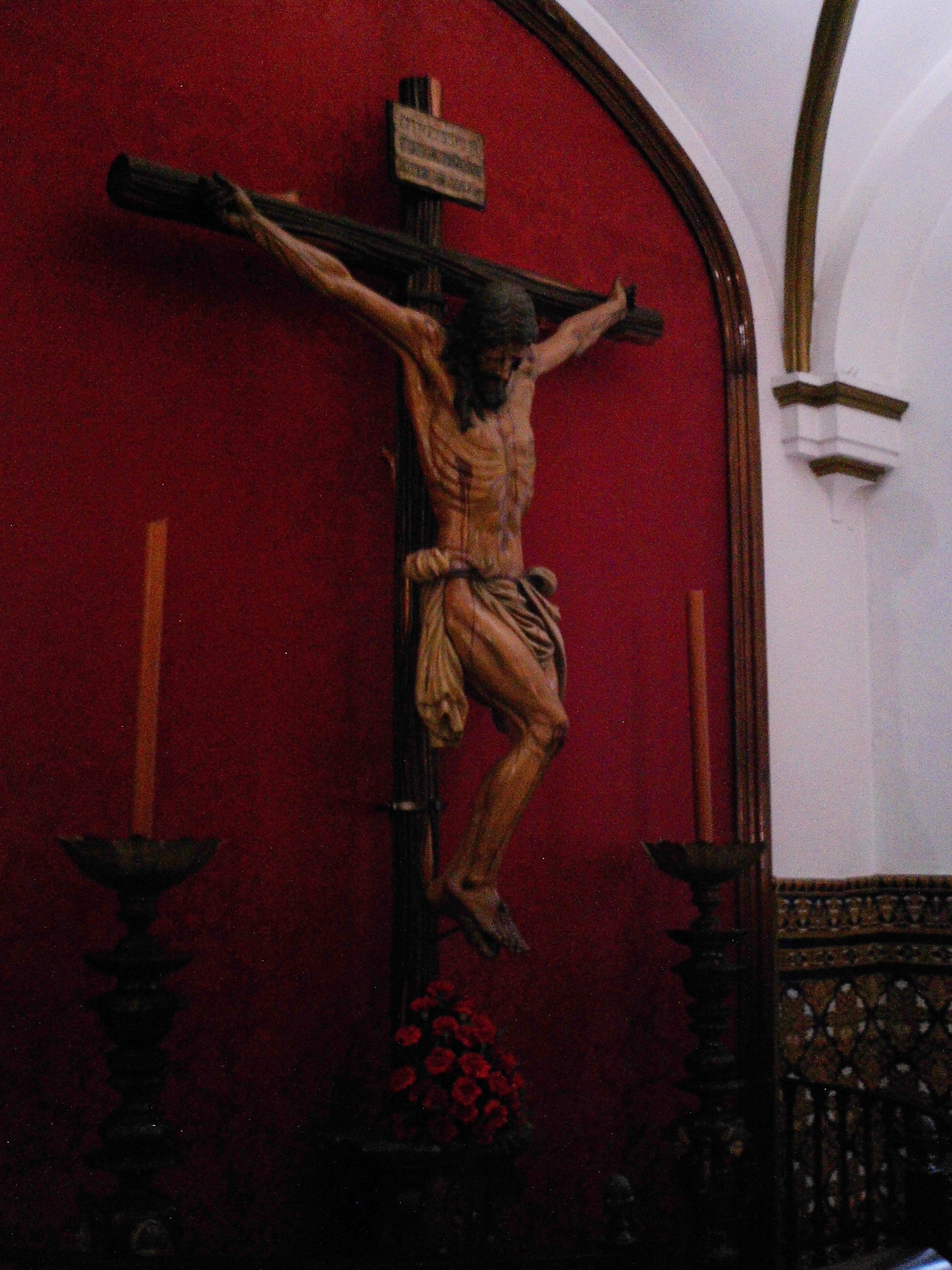 Cristo de la Salvación. Manuel Cerquera Becerra, 1935. Iglesia de San Buenaventura. Sevilla, Andalucía, España.